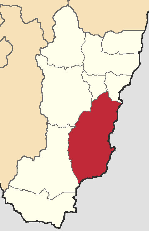 Mapa localizador del cantón en Zamora Chinchipe, Ecuador